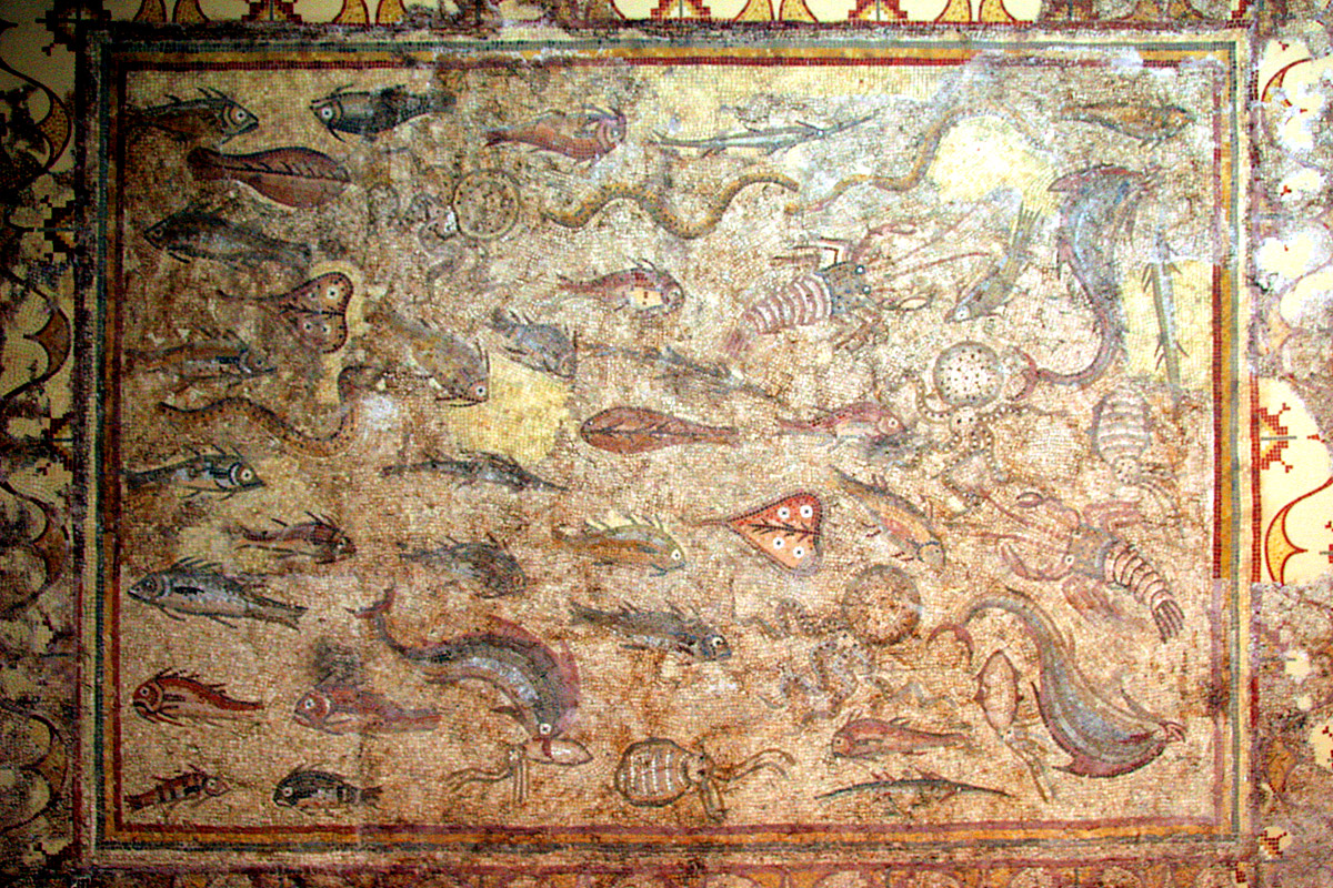 Mosaico de los peces de La Pineda. Museu Nacional Arquelògic de Tarragona (MNAT)